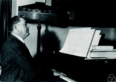 Foto di Derrick Norman Lehmer